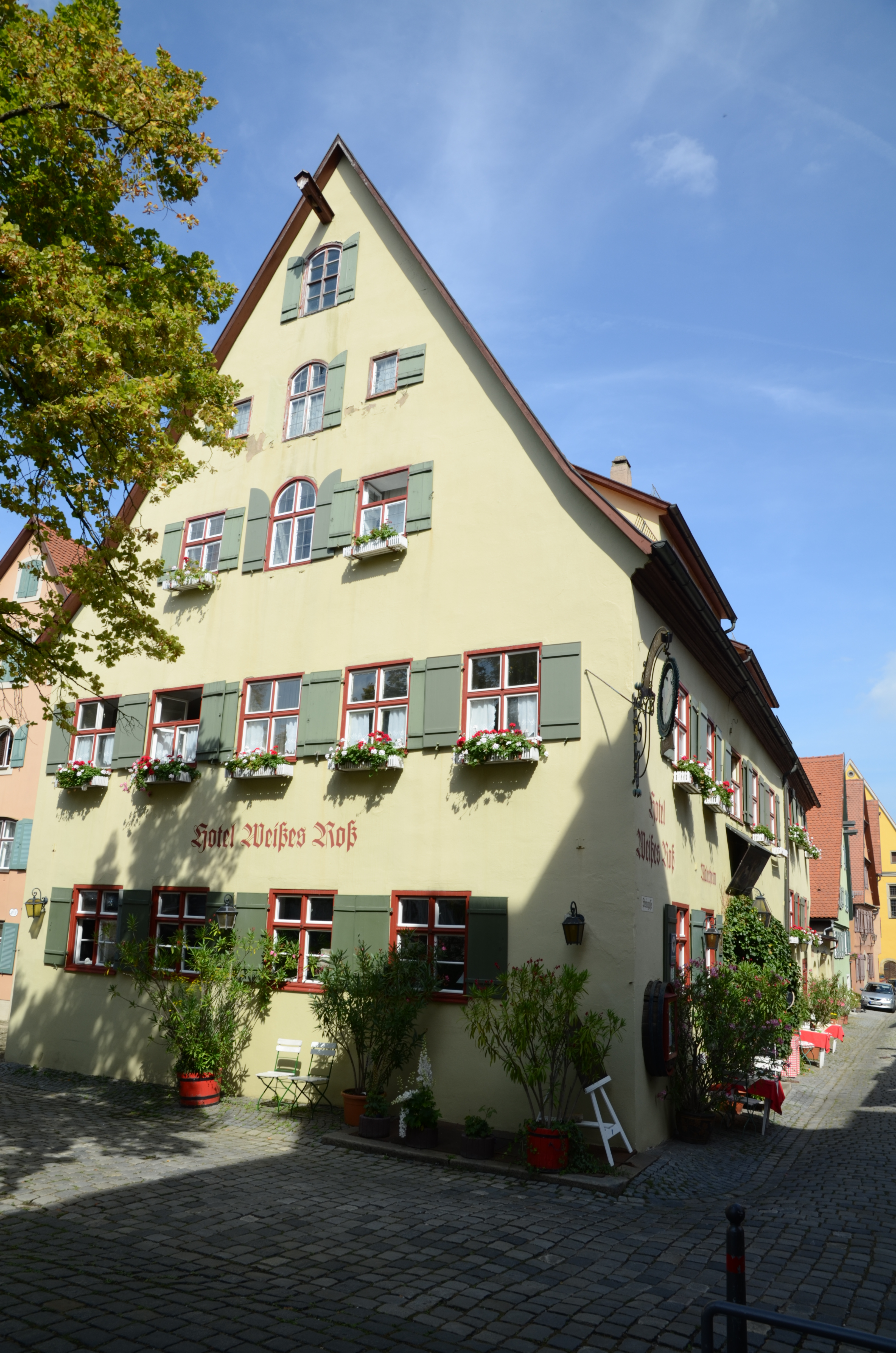 Baudenkmal in Dinkelsbühl: Adresse siehe Dateiname